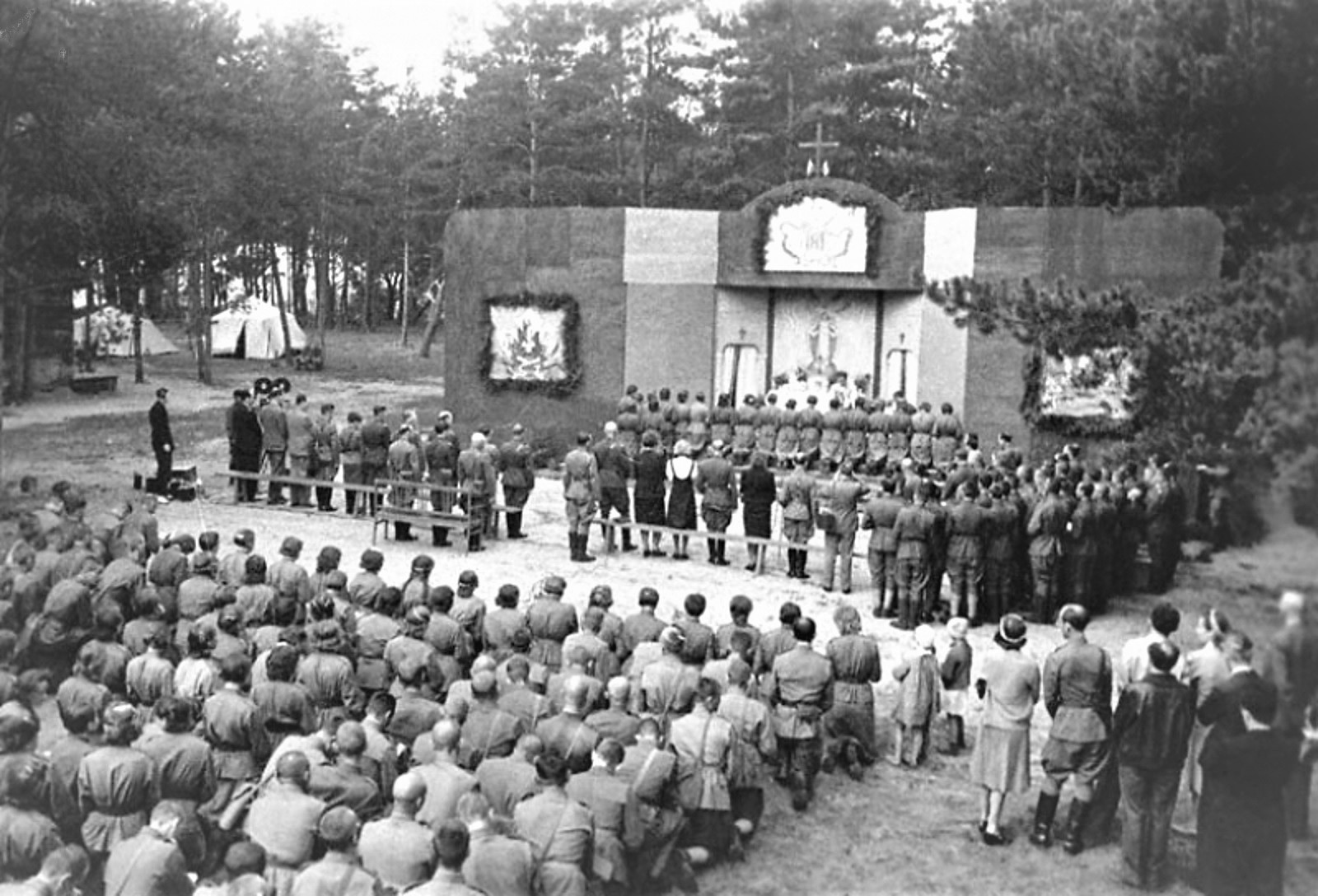 Бойцы 1-й польской дивизии имени Тадеуша Костюшко на молитве в церкви. Селецкие лагеря. Лето 1943 года